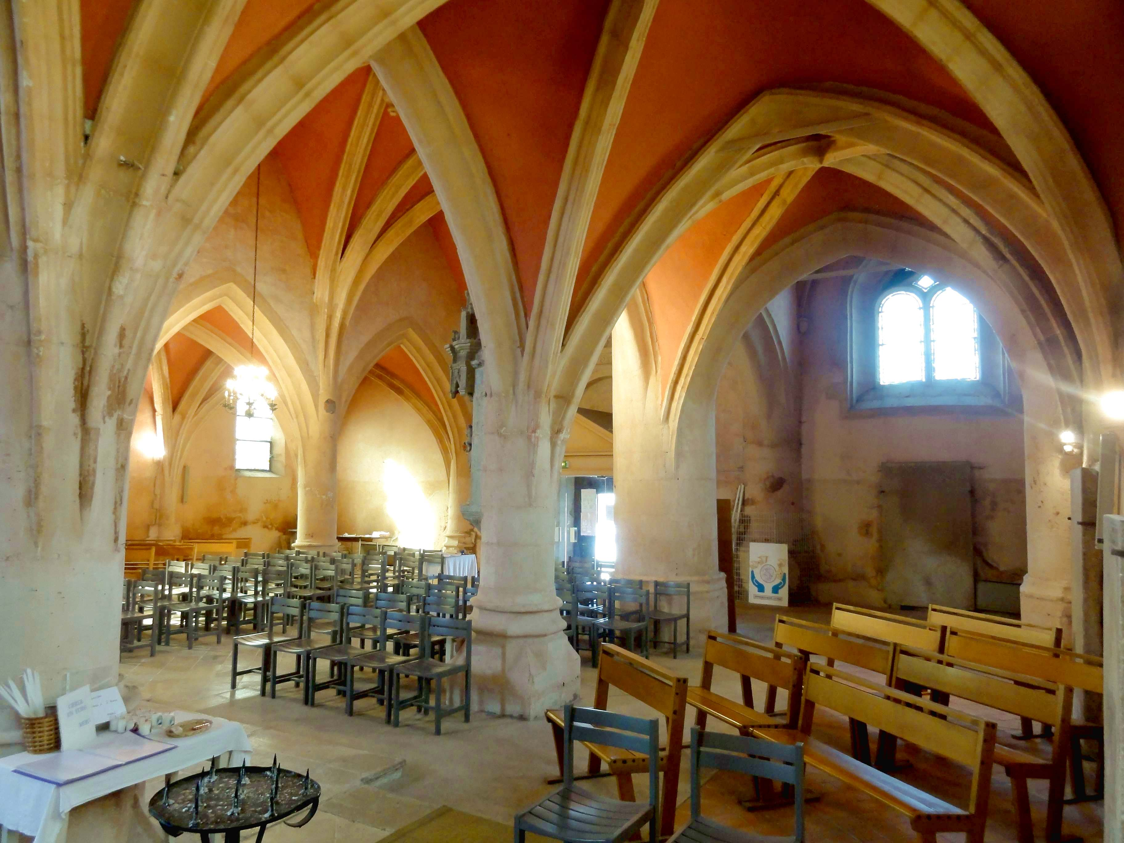 Intérieur de l'église - voir titre.